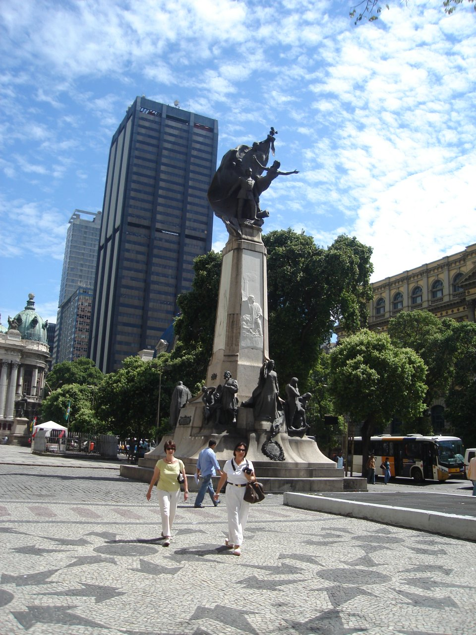 Cinelândia square in central Rio de Janeiro, Brazil